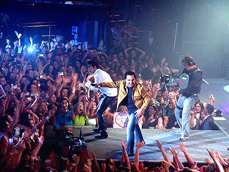 Brazilian duo Zezé Di Camargo & Luciano, show at Olimpia, SP, Brazil.Zezé & luciano no Olympia